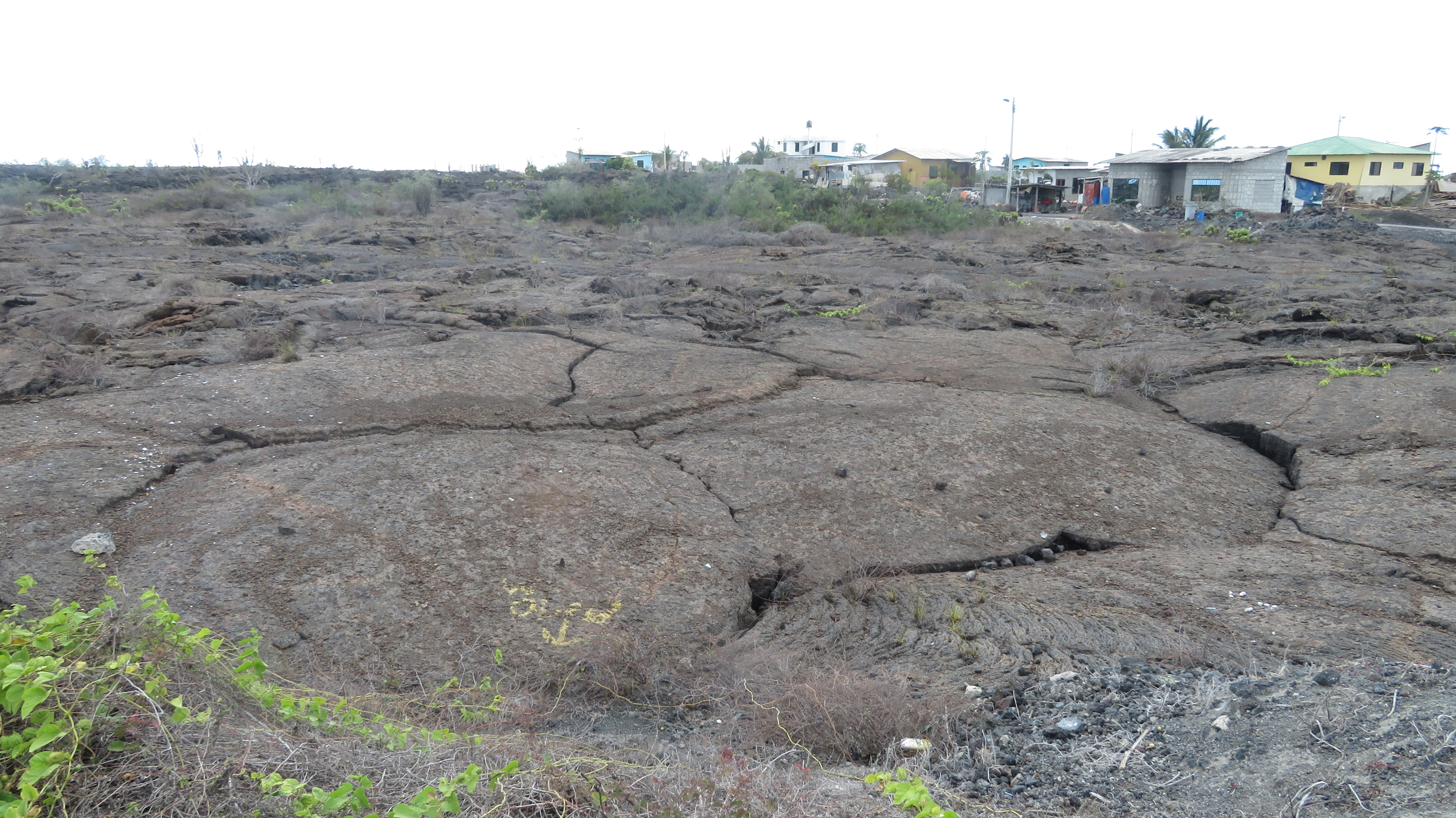 Flujo de lava,Puerto Villamil, Isla Isabela, Islas Galápagos, Ecuador